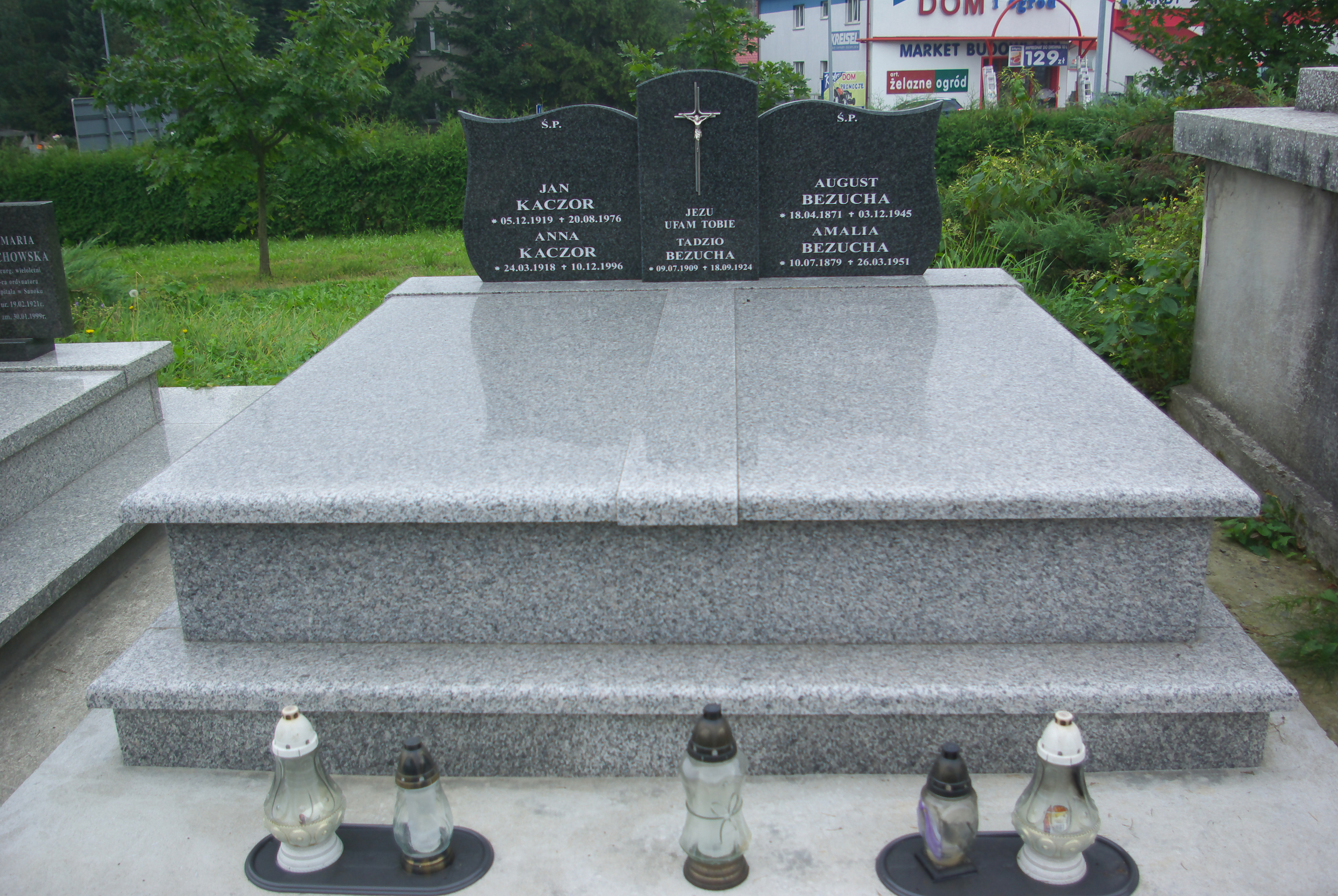 Nagrobek rodziny Bezuchów na Cmentarzu Centralnym w Sanoku (2018).